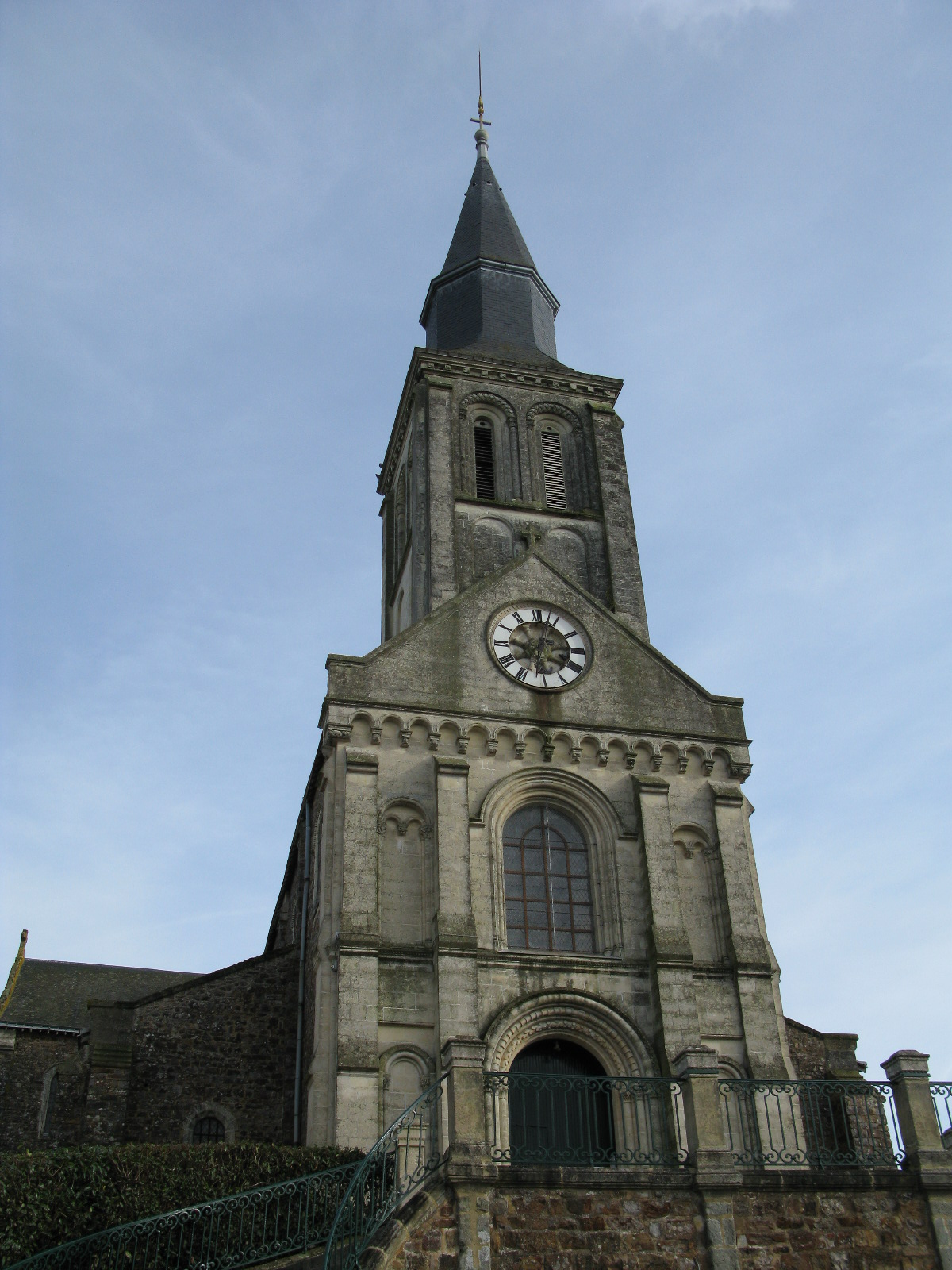 L'église de Saint-Denis-d'Orques en Mayenne